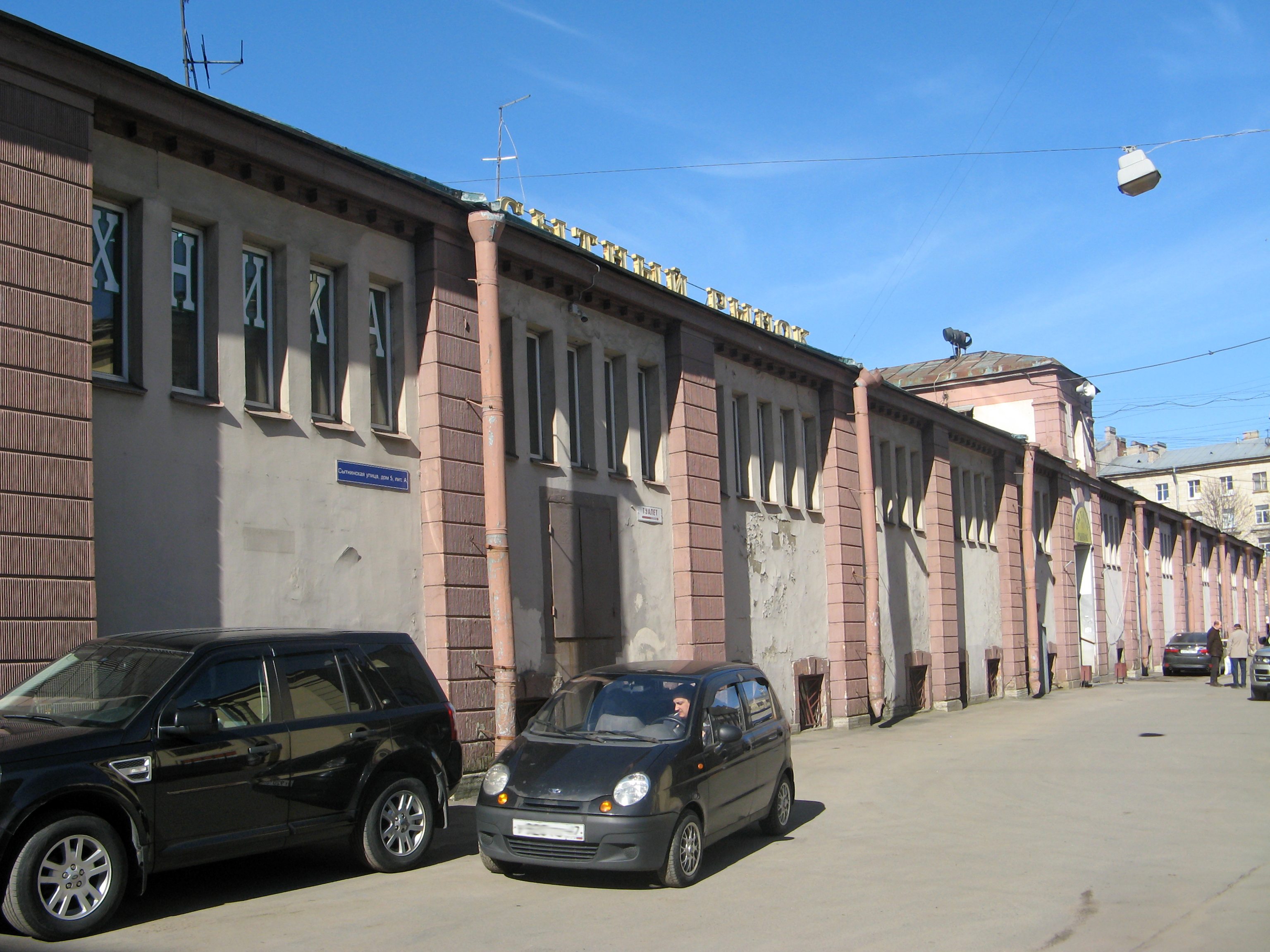 Здание Сытного рынка: Сытнинская улица, 5, Петроградский район, Санкт-Петербург